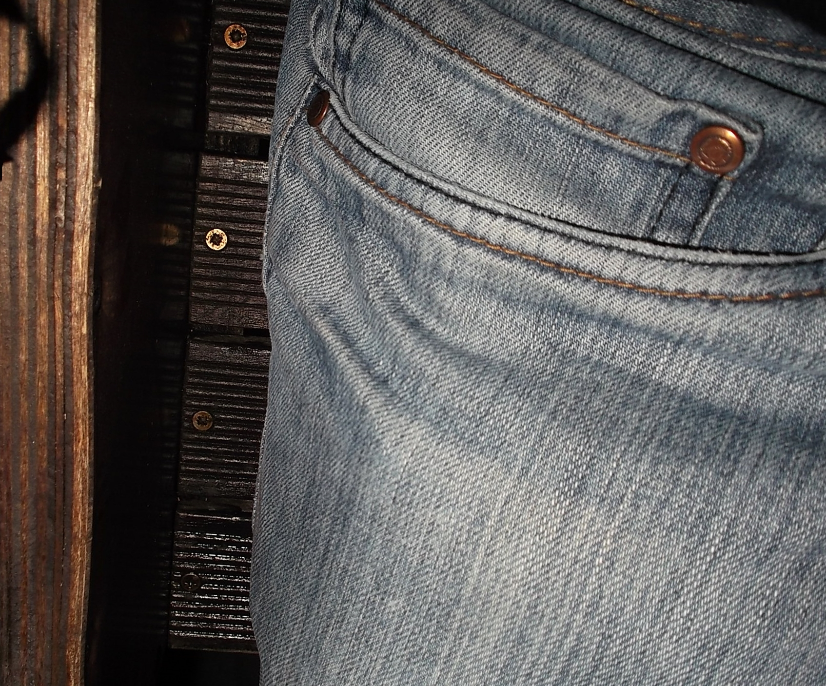 Jeans